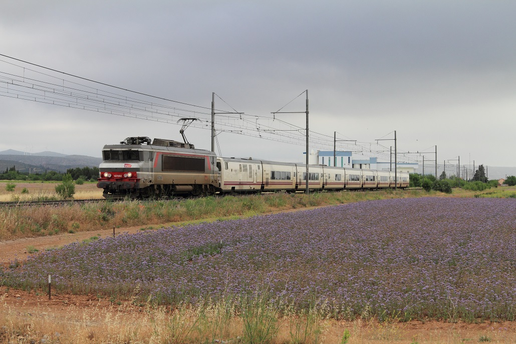 Passage d'un Talgo au PN 413 (PK 453,949) de la ligne en juin 2013, Languedoc-Roussillon, France.